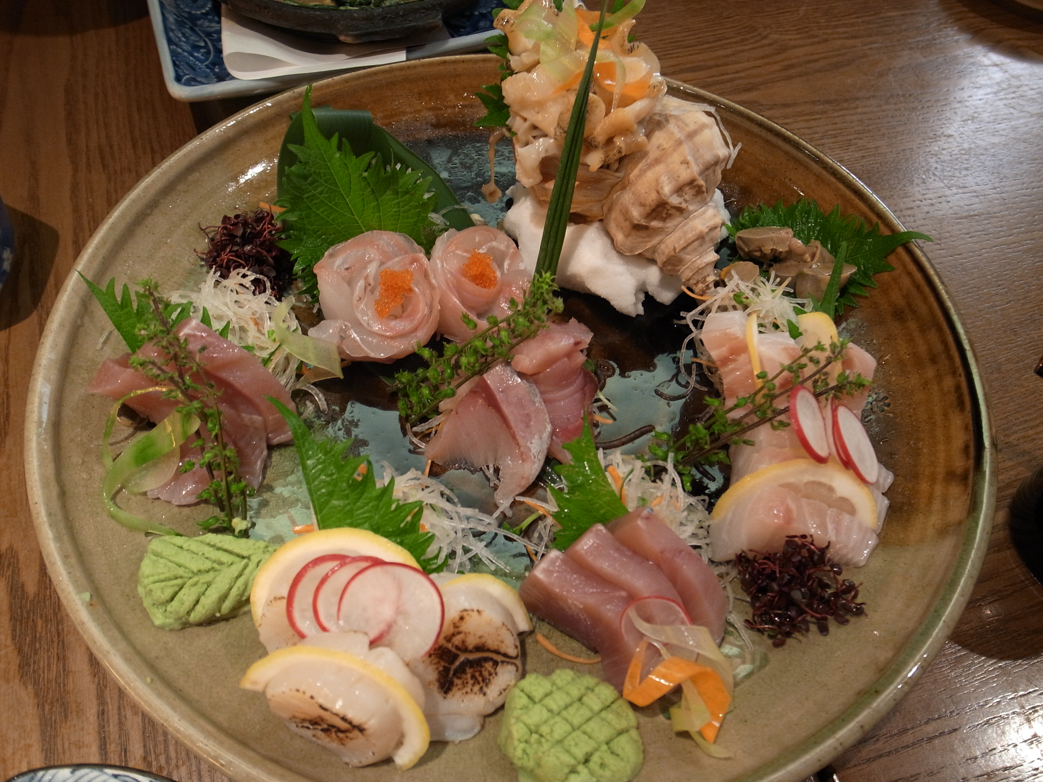 Sashimi combo.